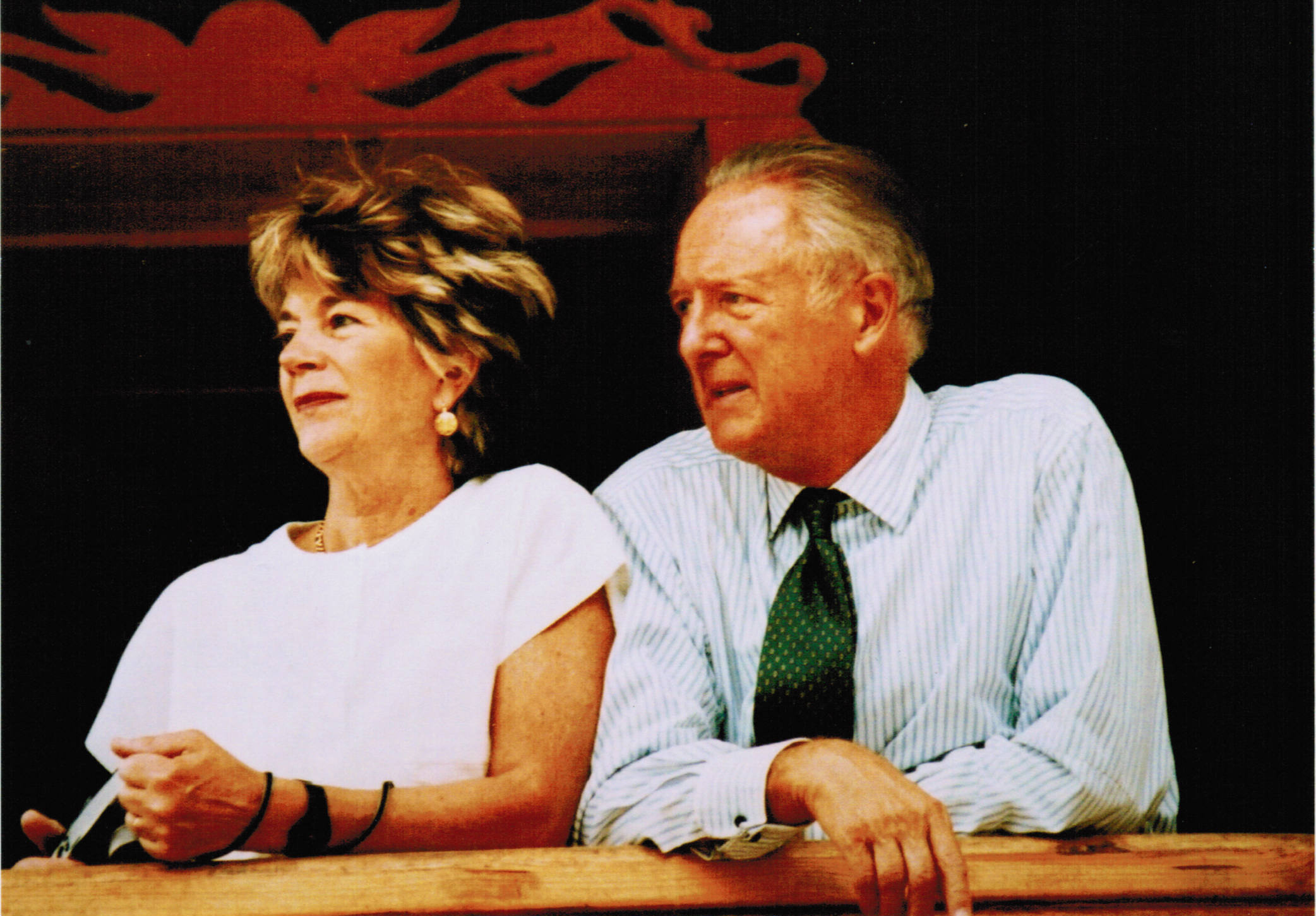 Никита Дмитриевич Лобанов-Ростовский